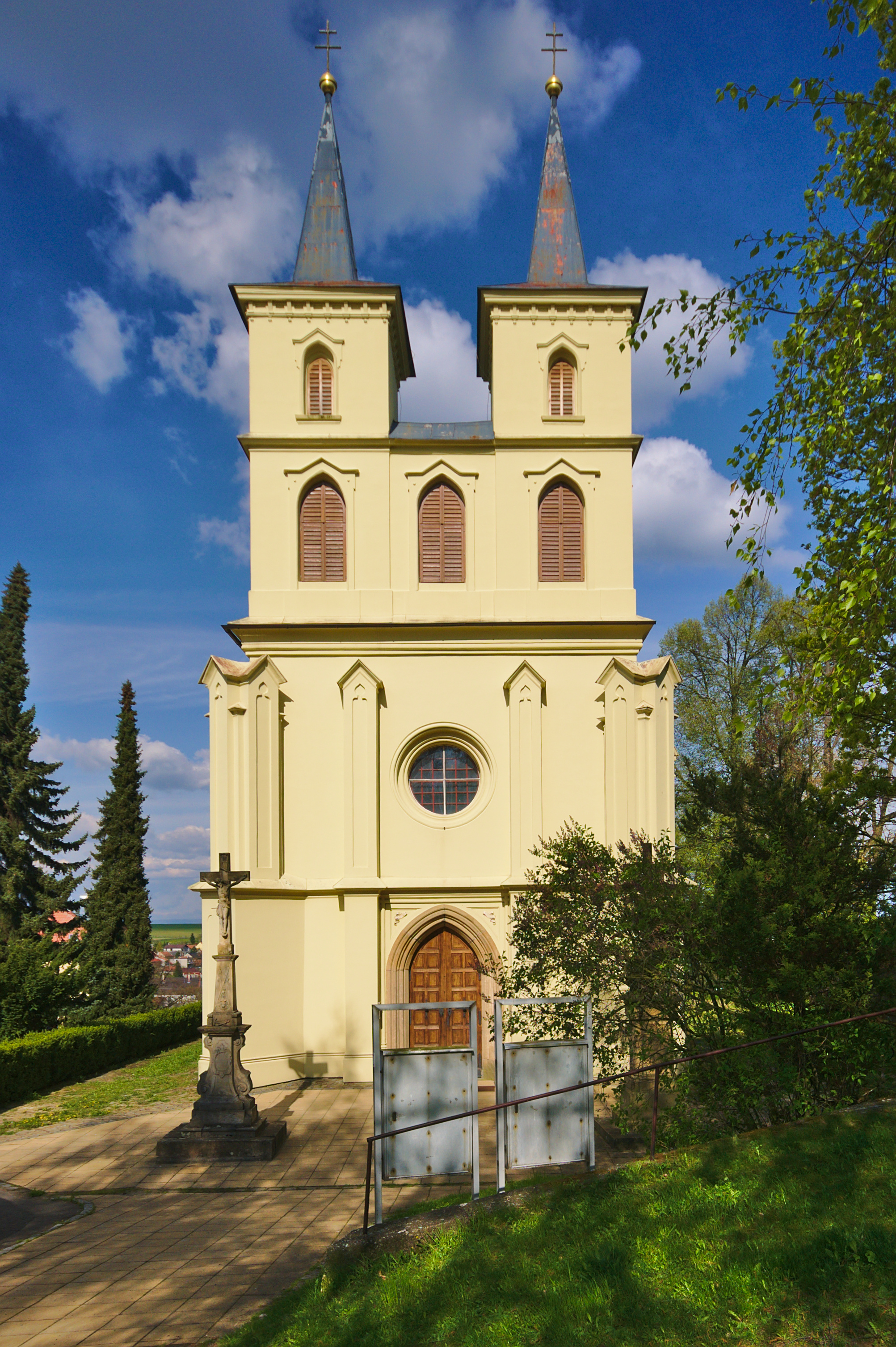 Kostel svatého Michala, Otaslavice, okres Prostějov